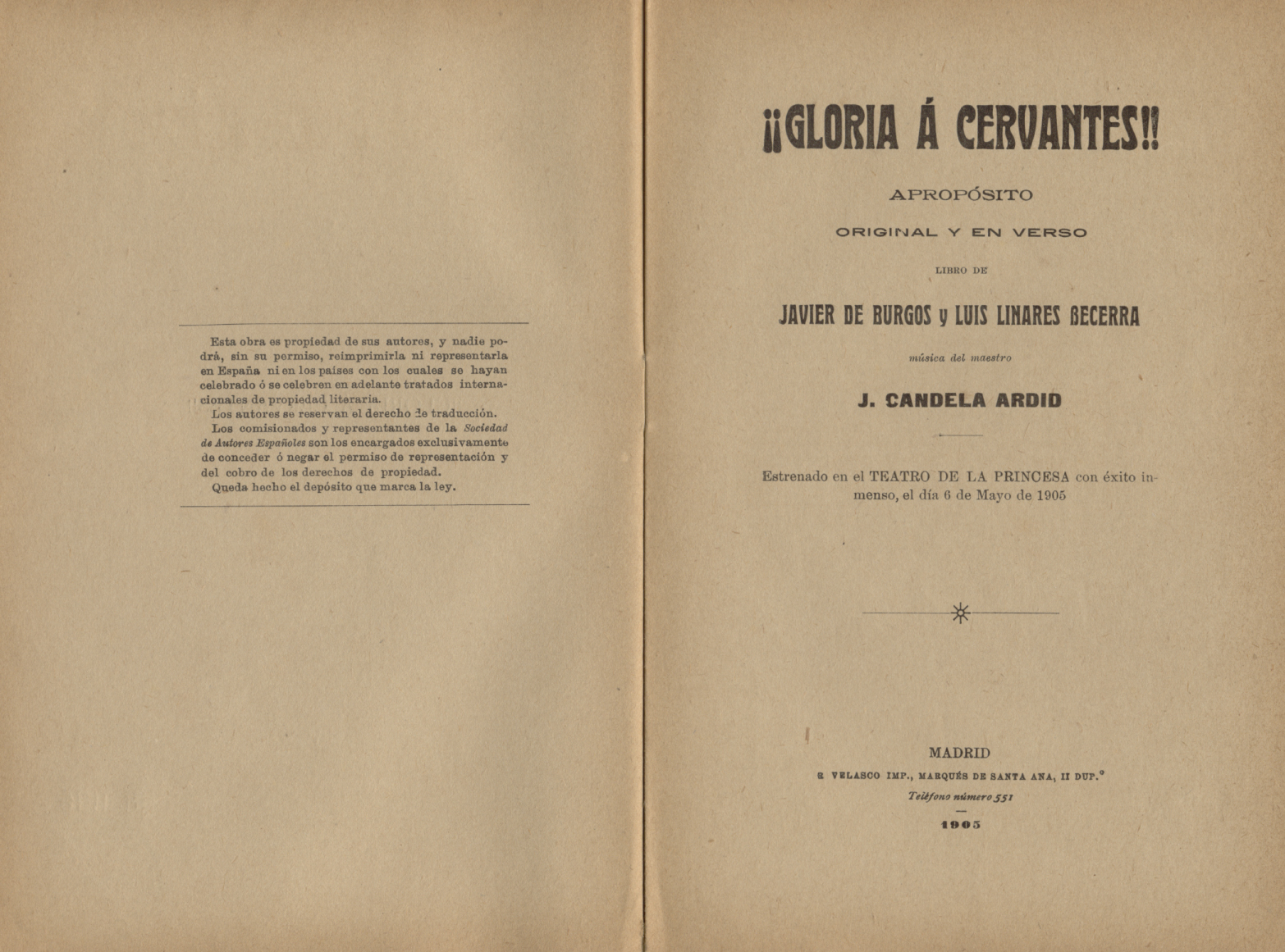 Portada del libreto de ¡Gloria a Cervantes! apropósito en verso obra de Francisco Javier de Burgos y Sarragoiti y Luis Linares Becerra.